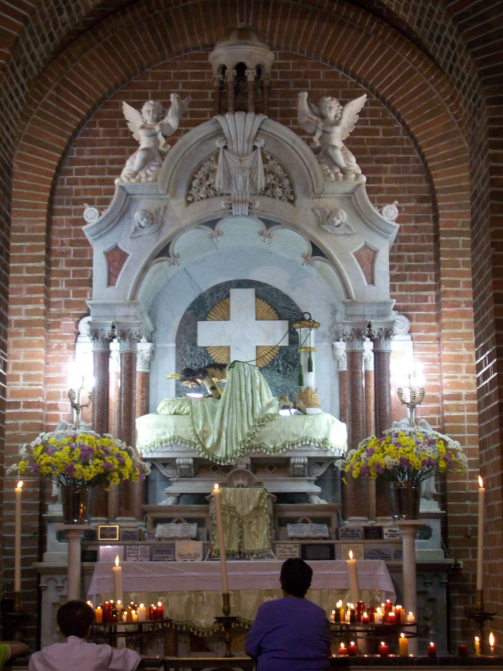 Catedral de Nuestra Señora del Rosario de Girardota en Girardota.